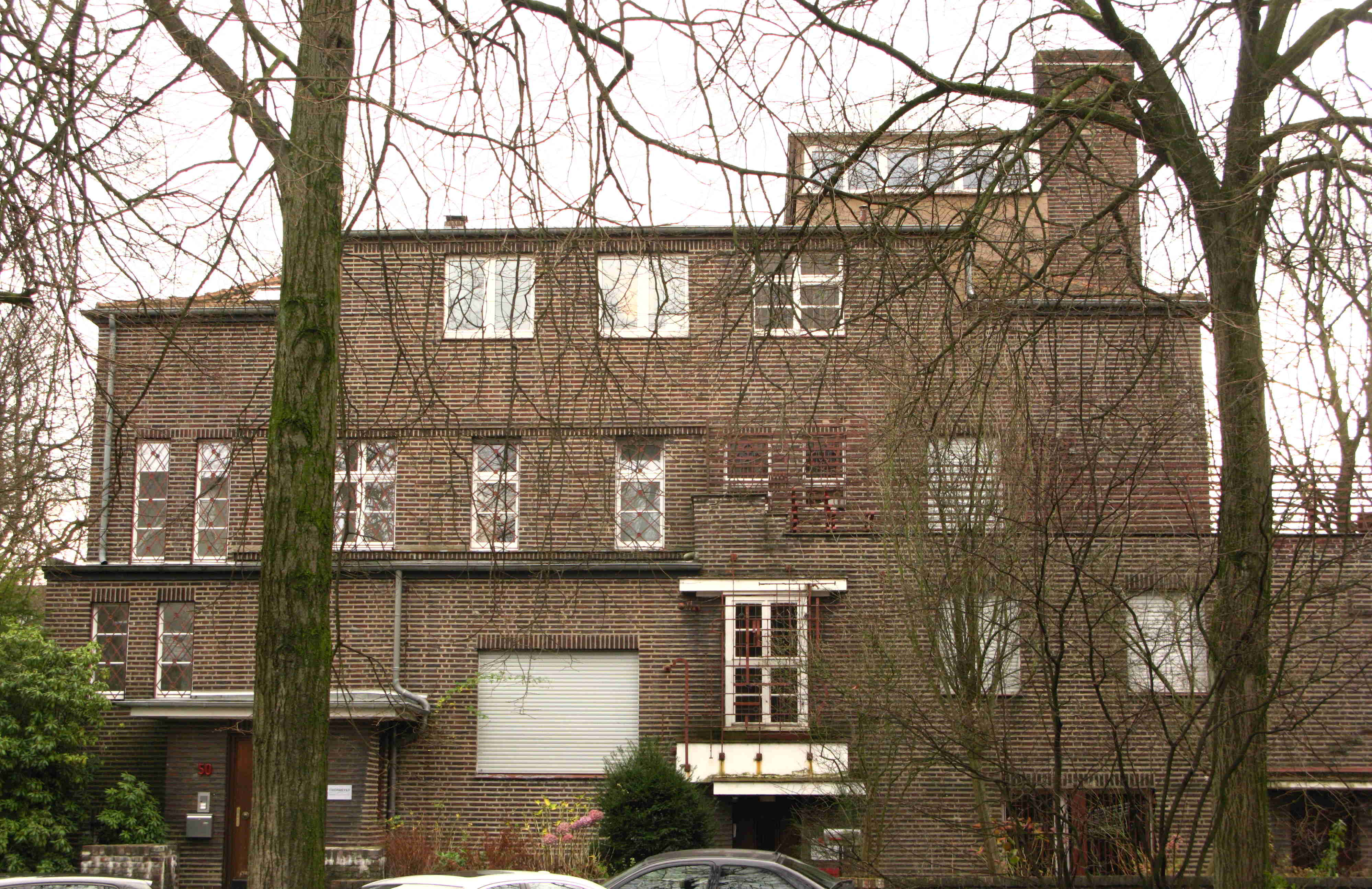 Moltkeviertel Essen: Atelierhaus Körner, Moltkestraße 50 (Ecke Camillo-Sitte-Platz)